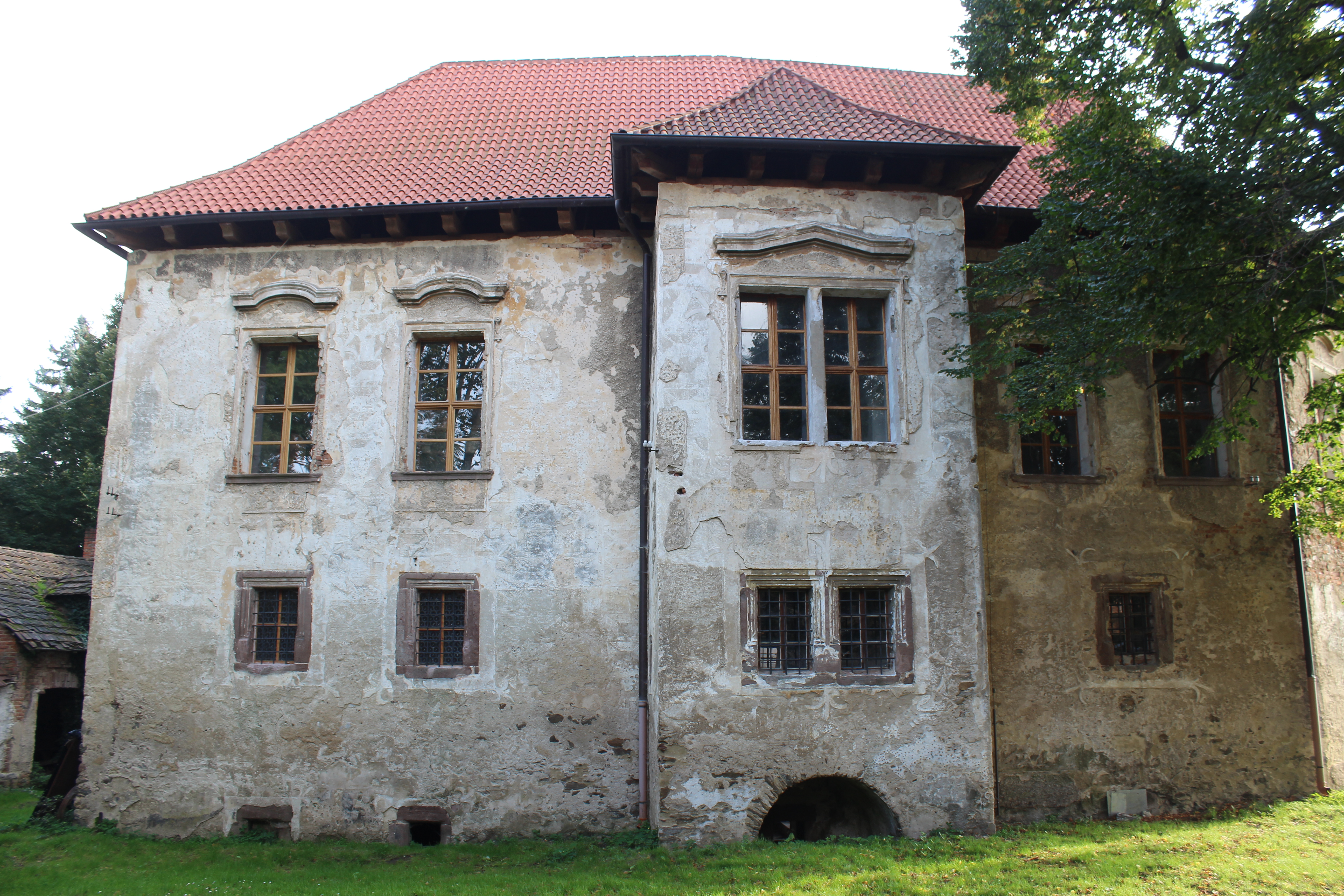 Vodní tvrz Popovice (okres Benešov)